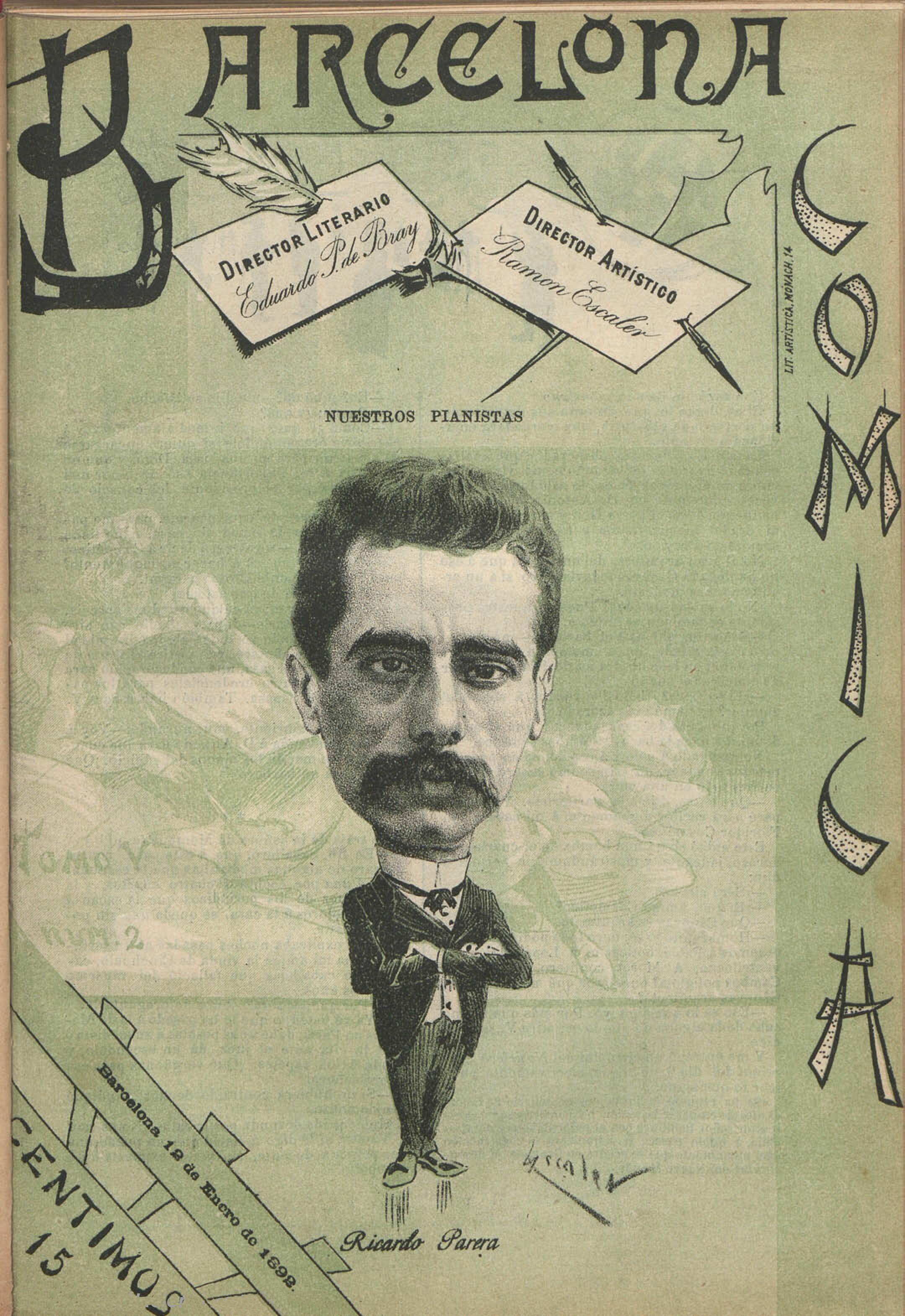 Barcelona Cómica, 12 de enero de 1892.